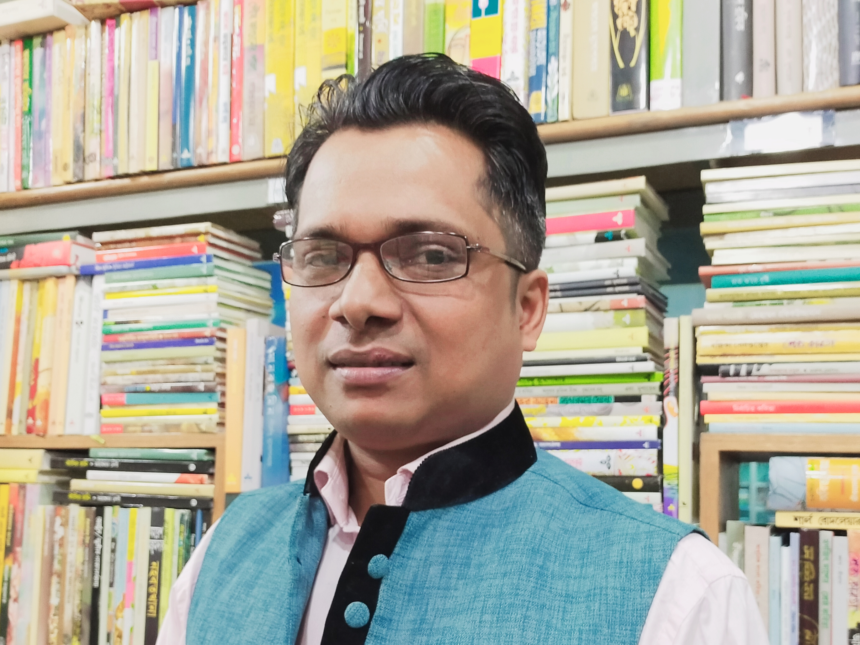 মাসুদ পথিক, চলচ্চিত্র পরিচালক, গীতিকার এবং কবি । আজিজ সুপার মার্কেট, শাহবাগ, ঢাকা। (২০২০)